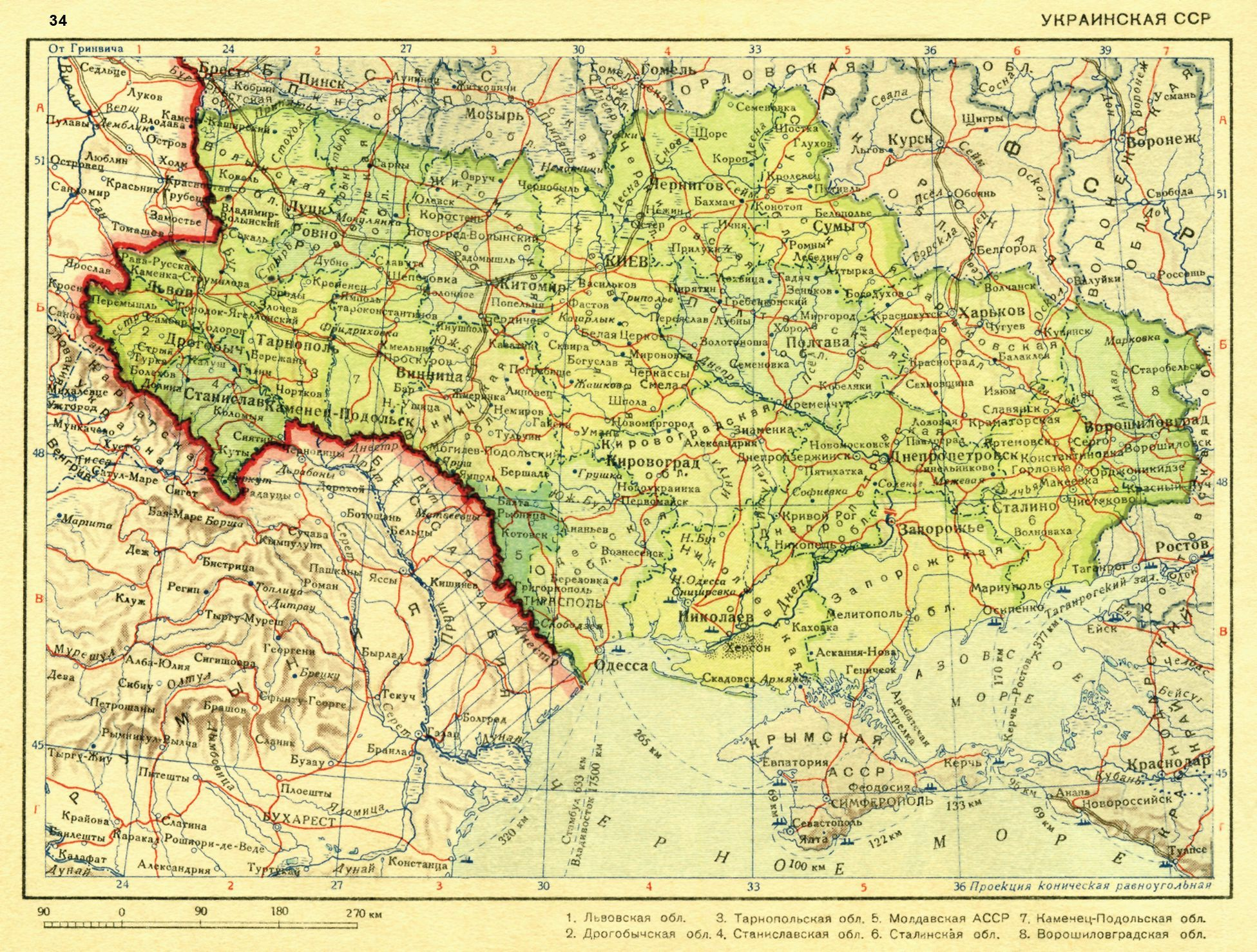 Ukrainian SSR (Украинская ССР).